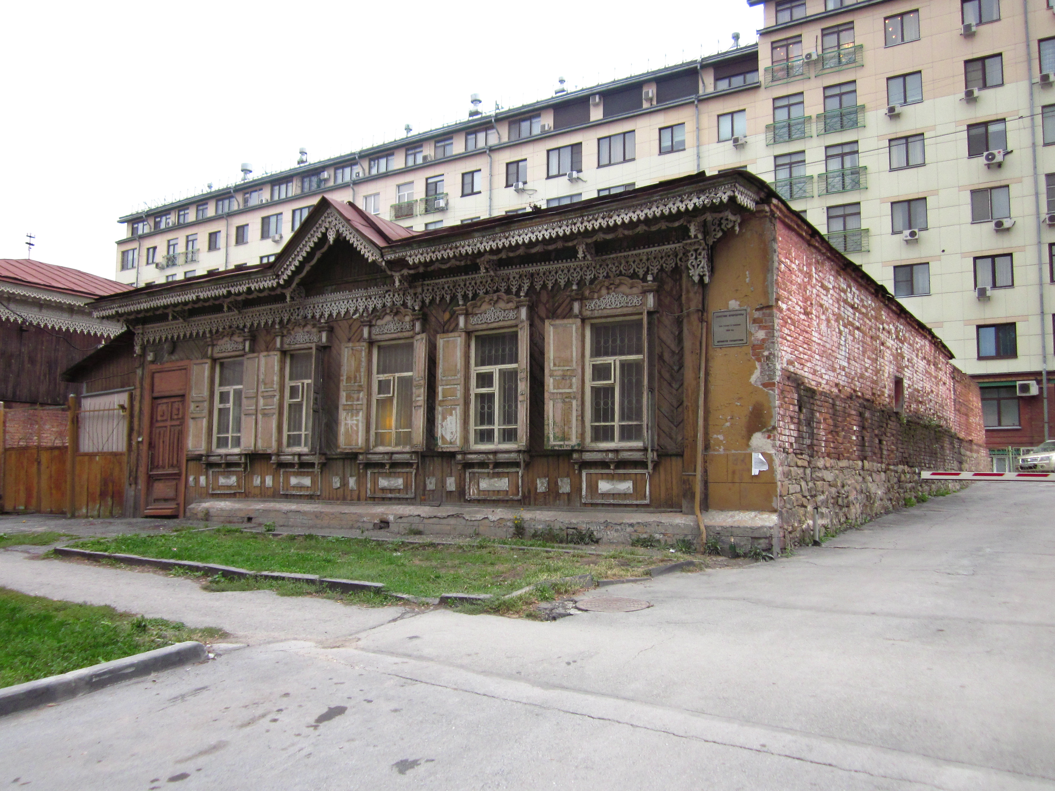 Дом Купца Г.Р. Бейлина на ул. Коммунистическая, 25. Построен в 1906 г.